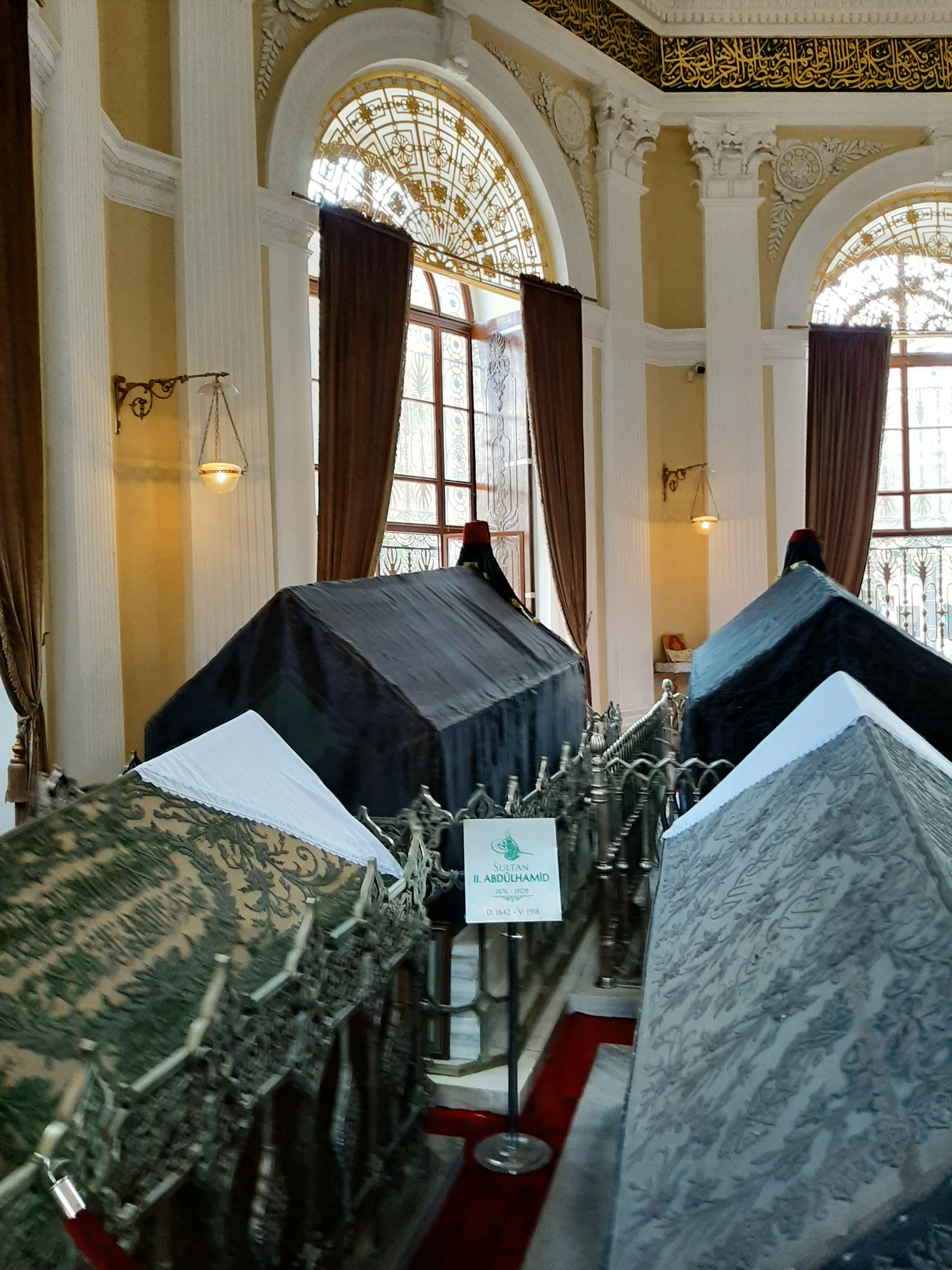 Todesstätte von Sultan Abdülhamid II.